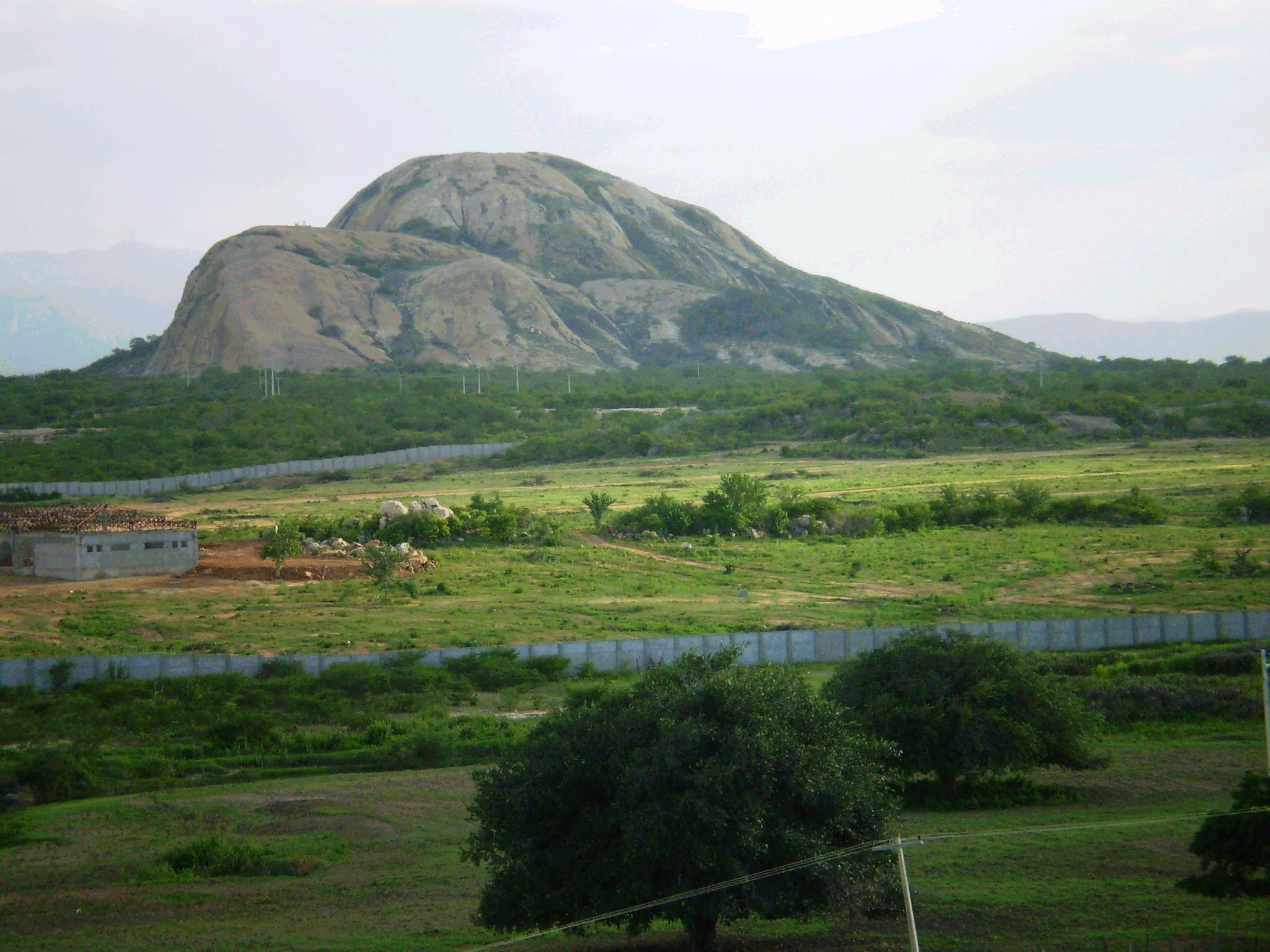 Serrote do Espinho Branco- Patos,PB,Brazil